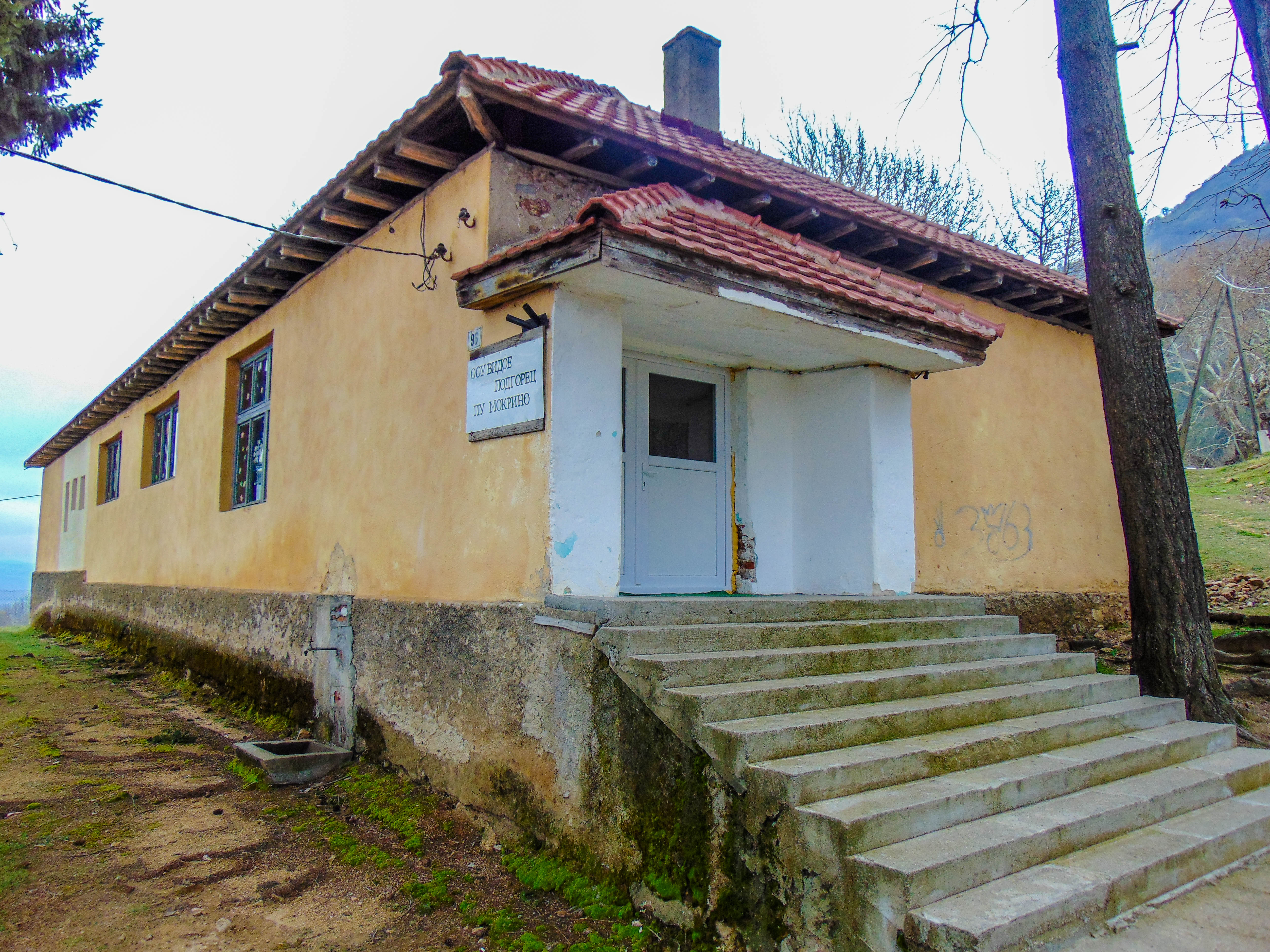 ОУ „Видое Подгорец“ - Мокрино